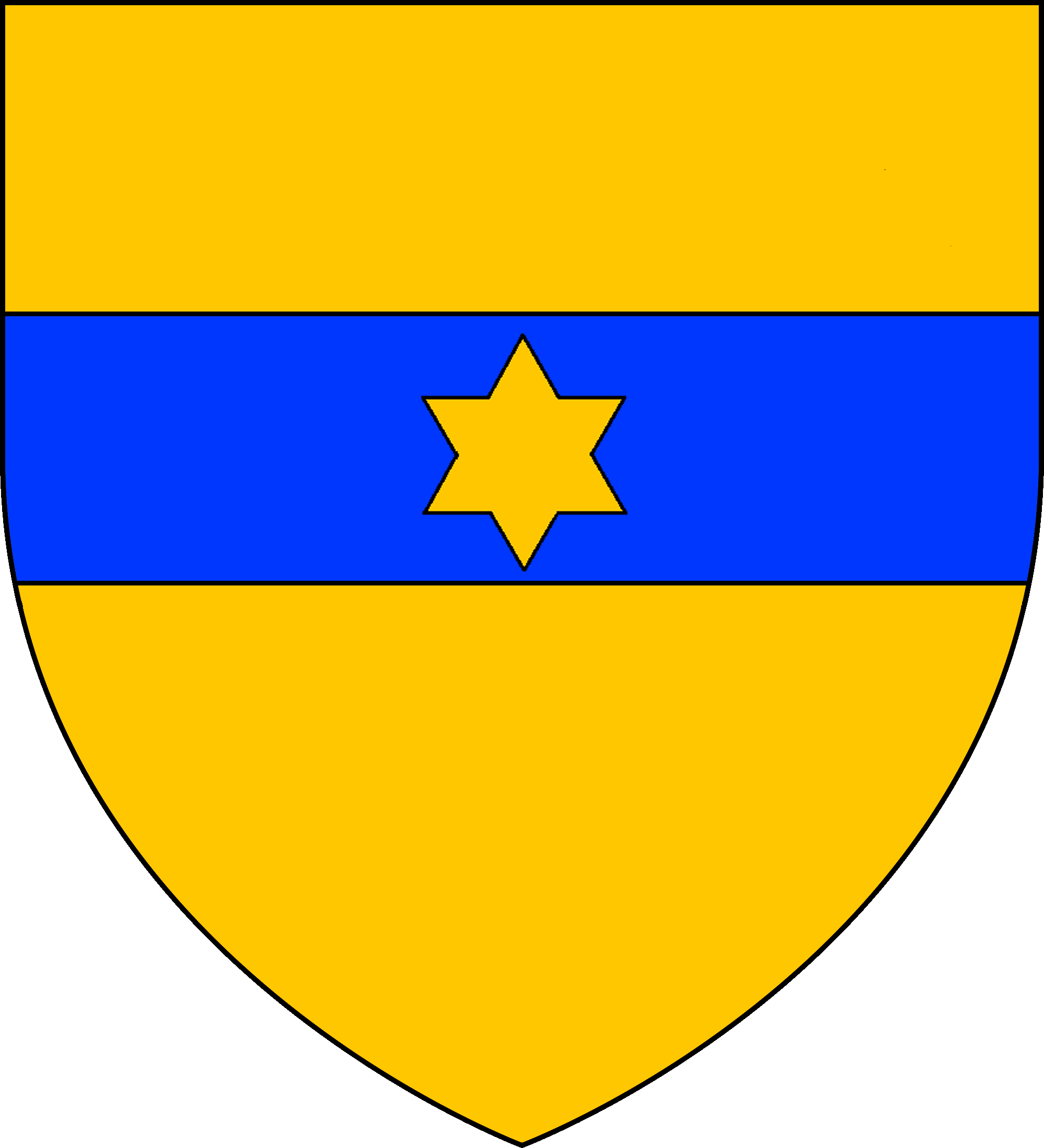 Blasón de la Casa Marchesi Special (Príncipi della Scaletta)